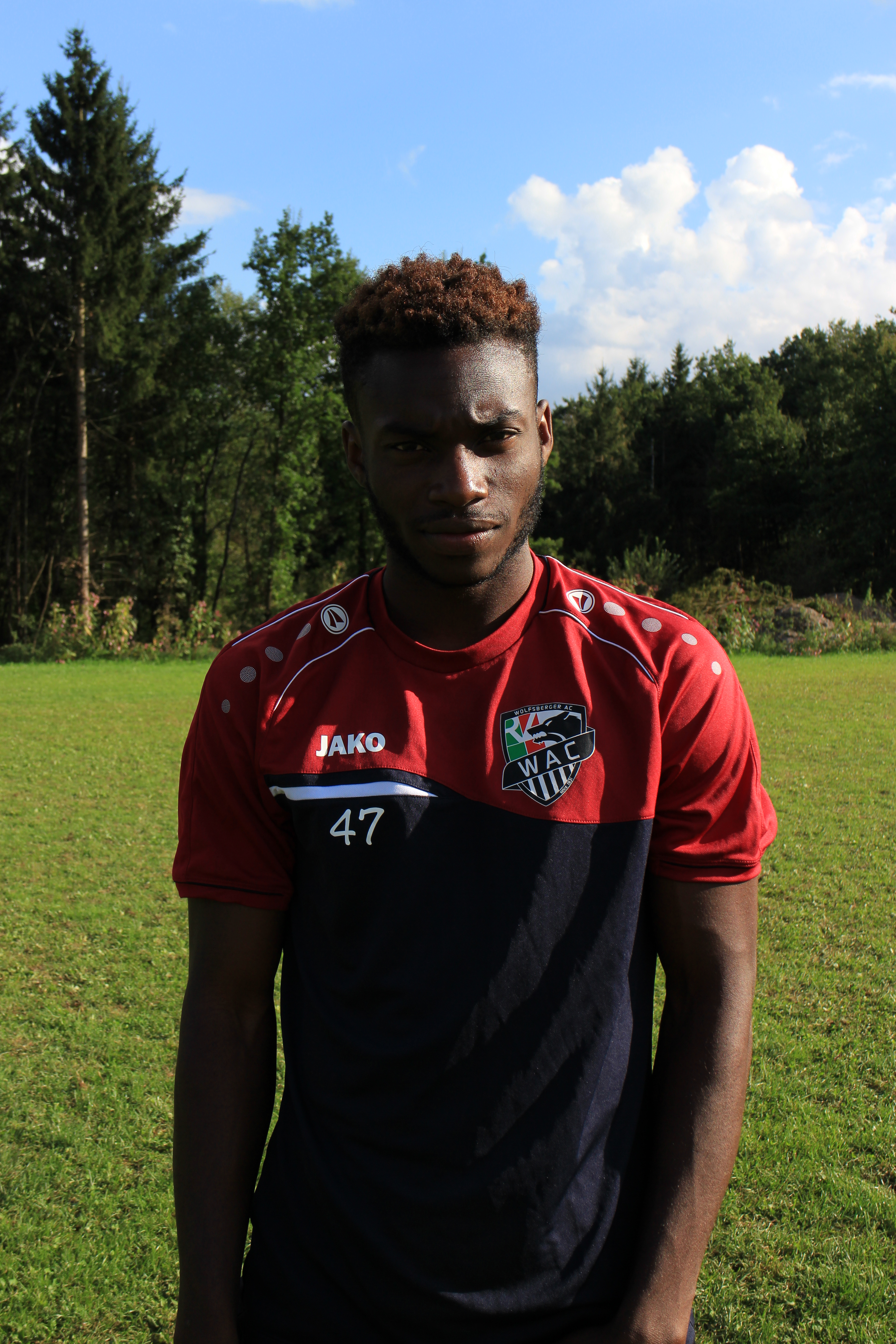 Ash Kigbu (WAC)